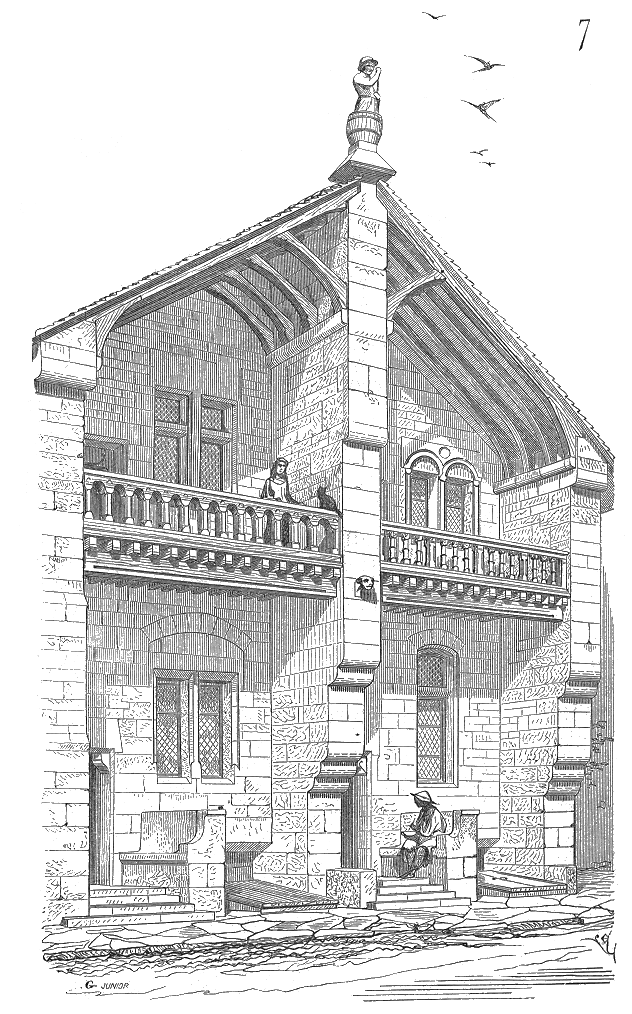 ... En A sont les entrées avec perrons et bancs de pierre; en B, les descentes de caves donnant, suivant l'habitude bourguignonne, sur la voie publique; en CC', les salles du rez-de-chaussée. En D sont deux petites cours entourées d'appentis en bois ne s'élevant que d'un rez-de-chaussée. La cage de l'escalier est commune, bien que ses rampes soient séparées. De la salle C, on monte au premier en prenant le palier E, et de la salle C' en prenant le palier F; ainsi, à l'étage supérieur, la porte de l'escalier de la maison C est en G, et celle de la maison C' est en H. En I est un puits commun. Sur la rue, cette maison double présente la façade (7) ...